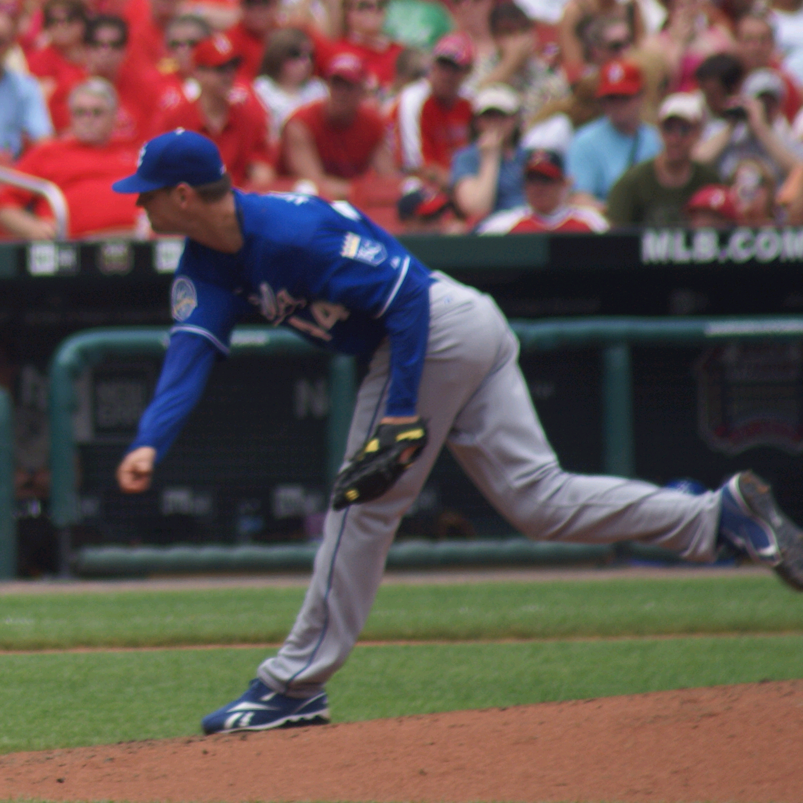 Luke Hochevar